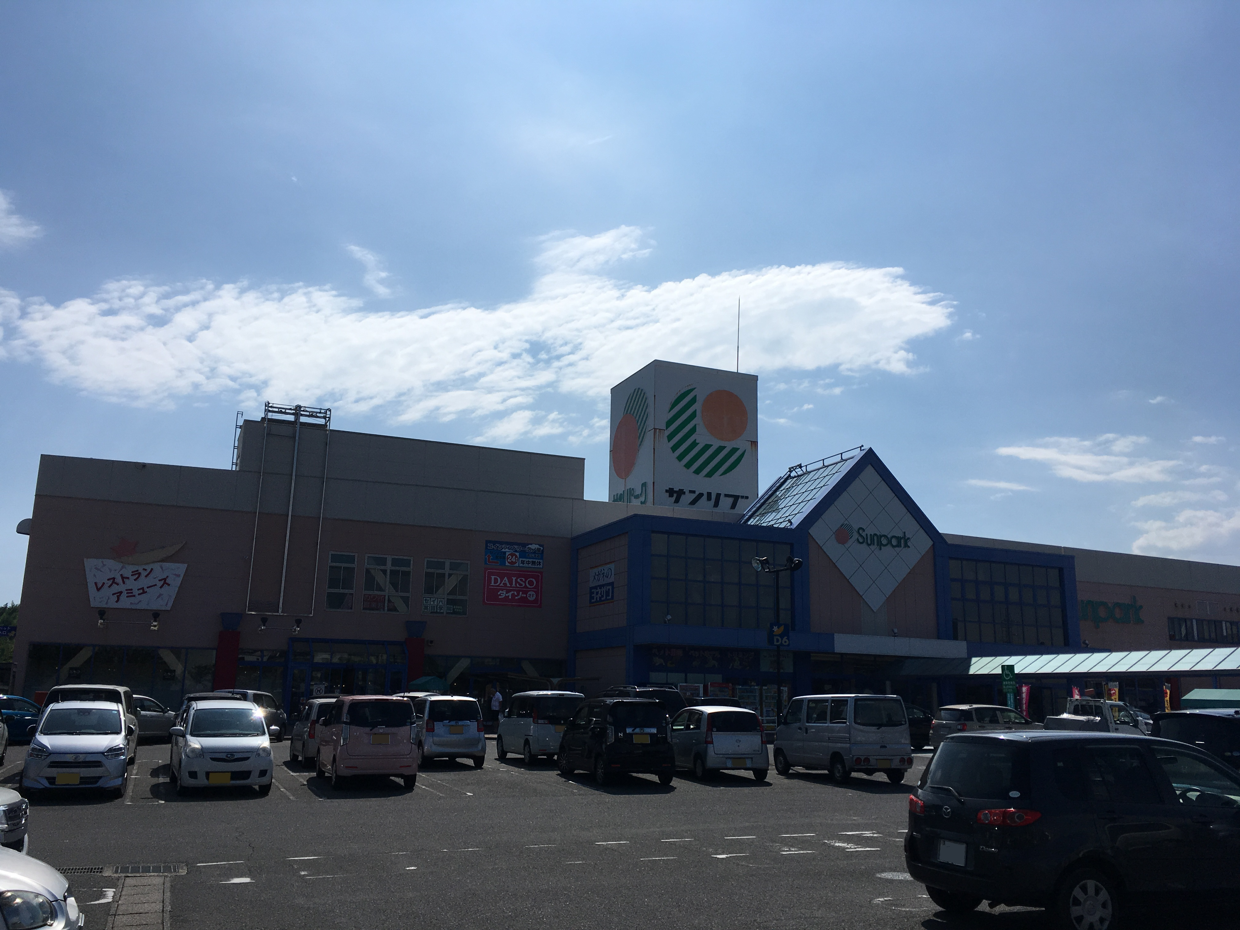 サンパークあじす 東入口